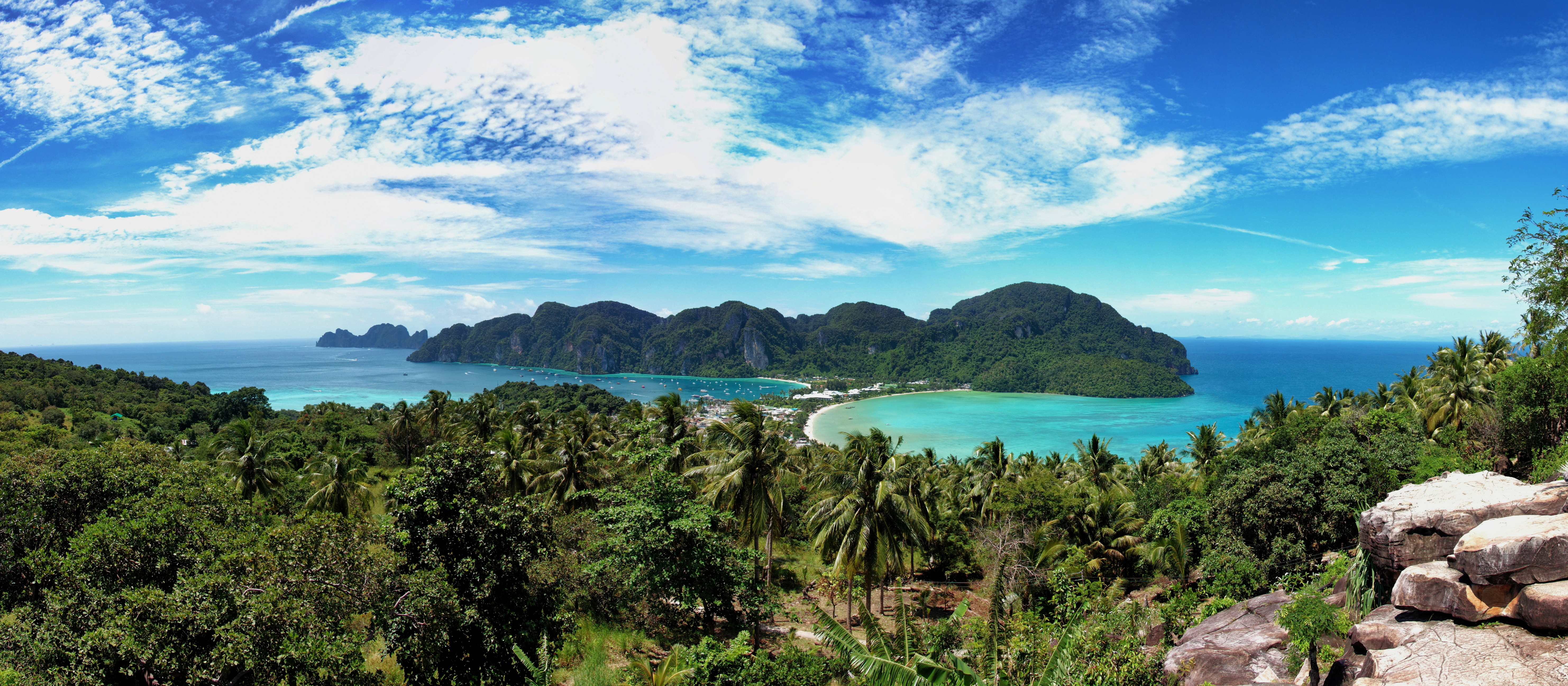 Koh Phi Phi – Panorama